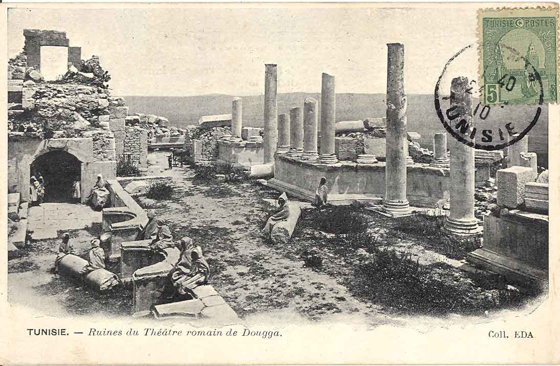 Le théâtre en 1900 Bertrand Bouret